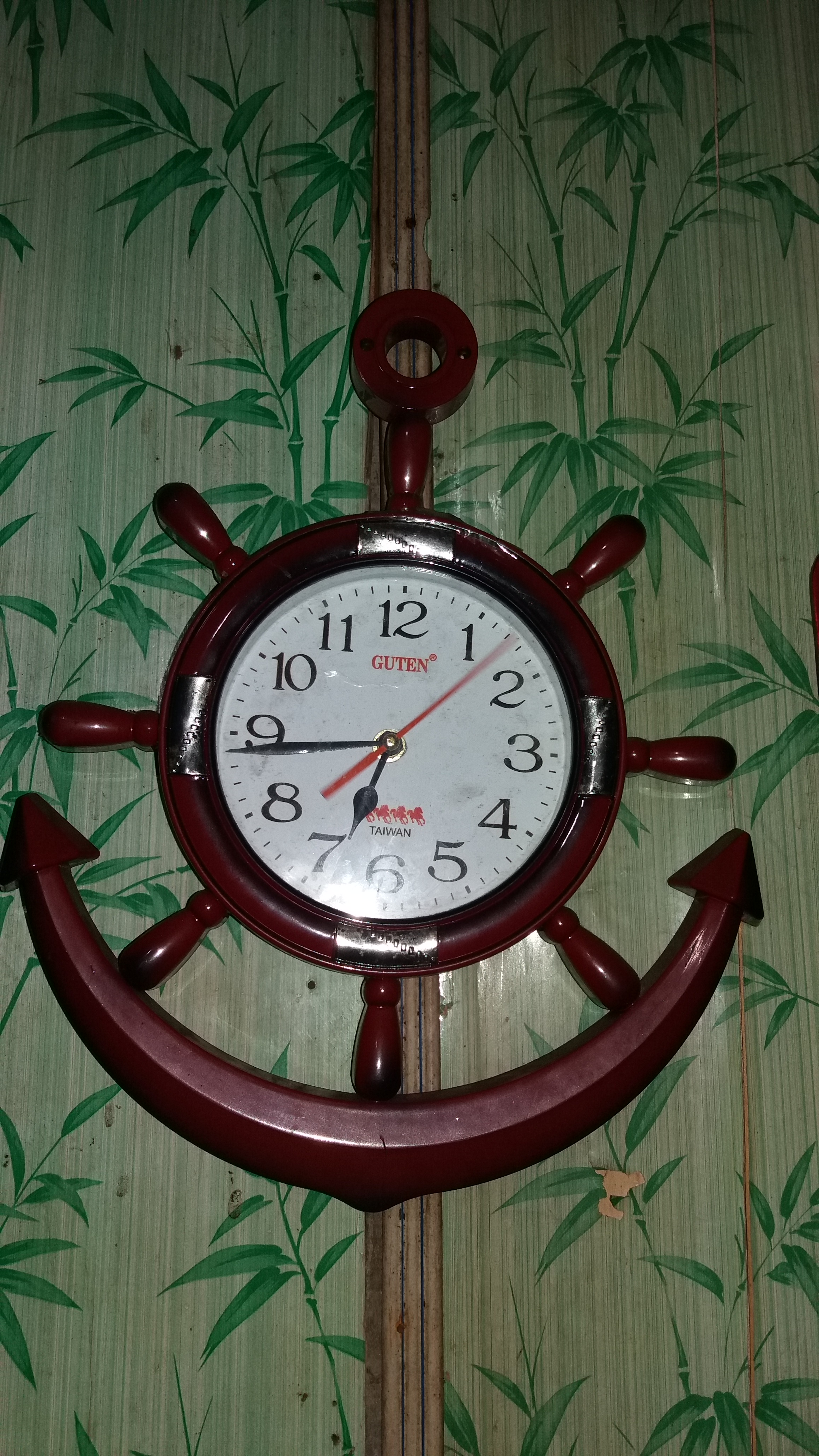 Một cái đồng hồ chạy bằng pin hình mỏ neo